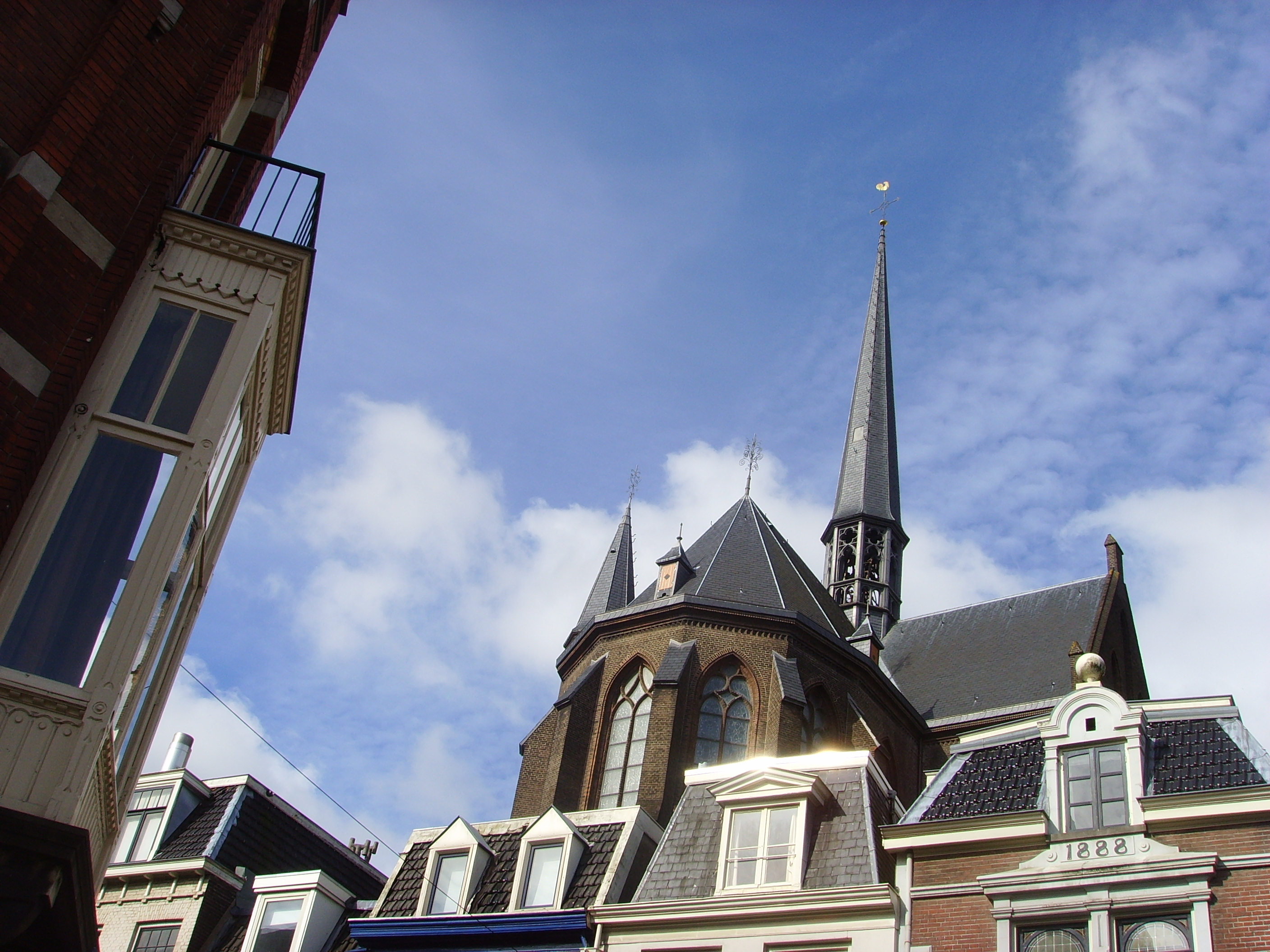 Bovenkant van de Sint-Willibrordkerk (Utrecht), die deels is ingebouwd tussen omringende woningen. Foto gemaakt vanaf Jansdam